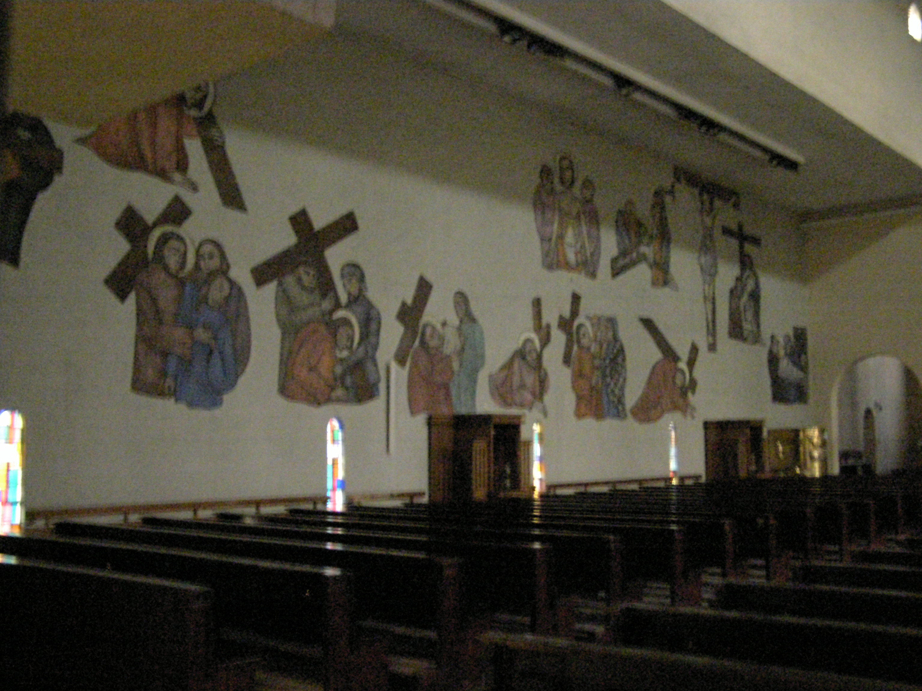 Wnętrze kościoła p.w. św. Antoniego w Pile